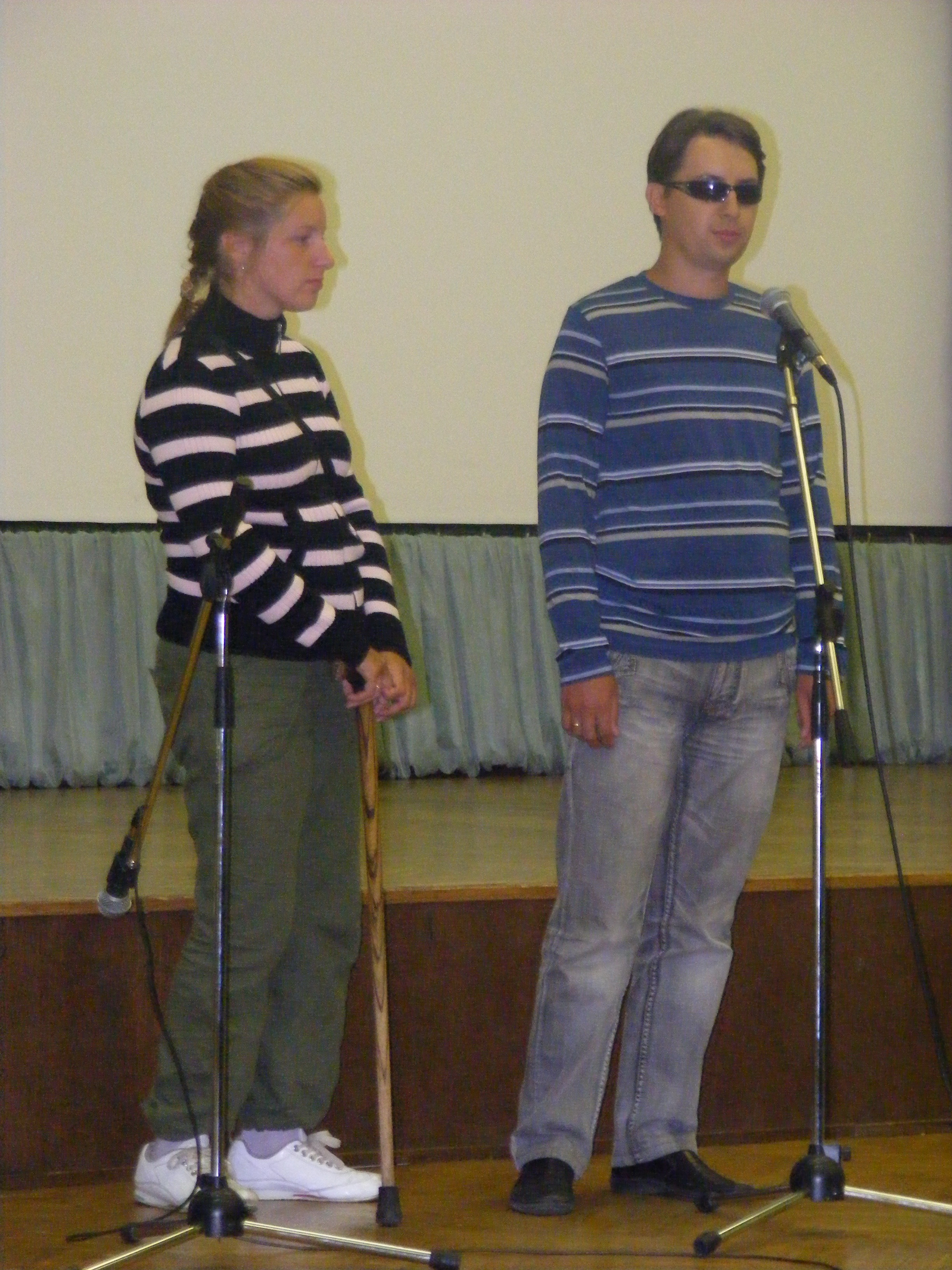 Олександр Романов, м. Клин (Росія), 1 місце в номінції "Декоративно-ужиткове мистецтво", підномінація "Різьблення". Хлопець зовсім не має зору